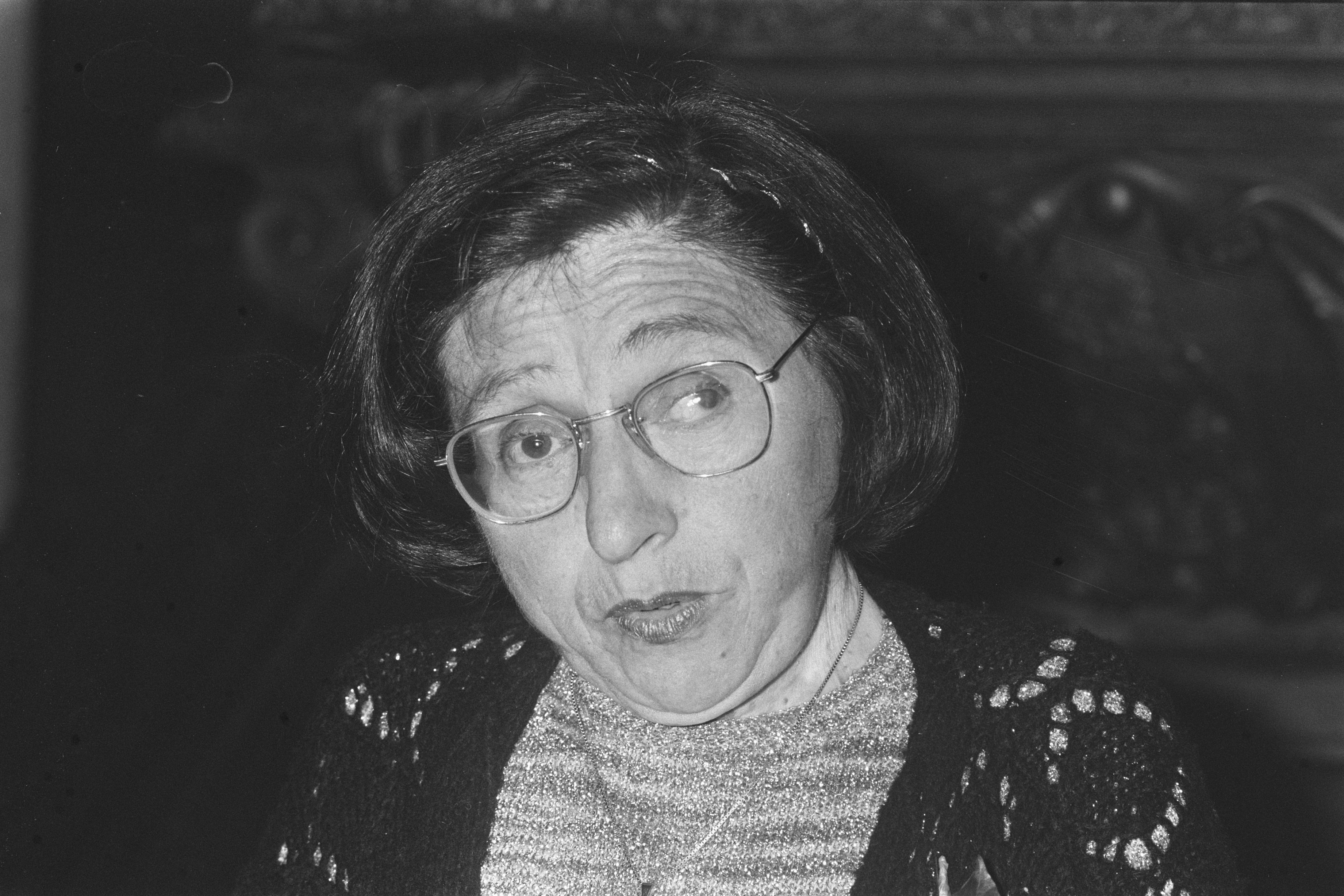 Collectie / Archief : Fotocollectie Anefo Reportage / Serie : [ onbekend ] Beschrijving : Afscheidscollege prof. dr. Lea Dasberg in Amsterdam; prof. dr. Lea Dasberg , kop Datum : 9 maart 1987 Locatie : Amsterdam, Noord-Holland Trefwoorden : Afscheidscolleges Persoonsnaam : prof. dr. Lea Dasberg Fotograaf : Gerrits, Roland / Anefo Auteursrechthebbende : Nationaal Archief Materiaalsoort : Negatief (zwart/wit) Nummer archiefinventaris : bekijk toegang 2.24.01.05 Bestanddeelnummer : 933-9151